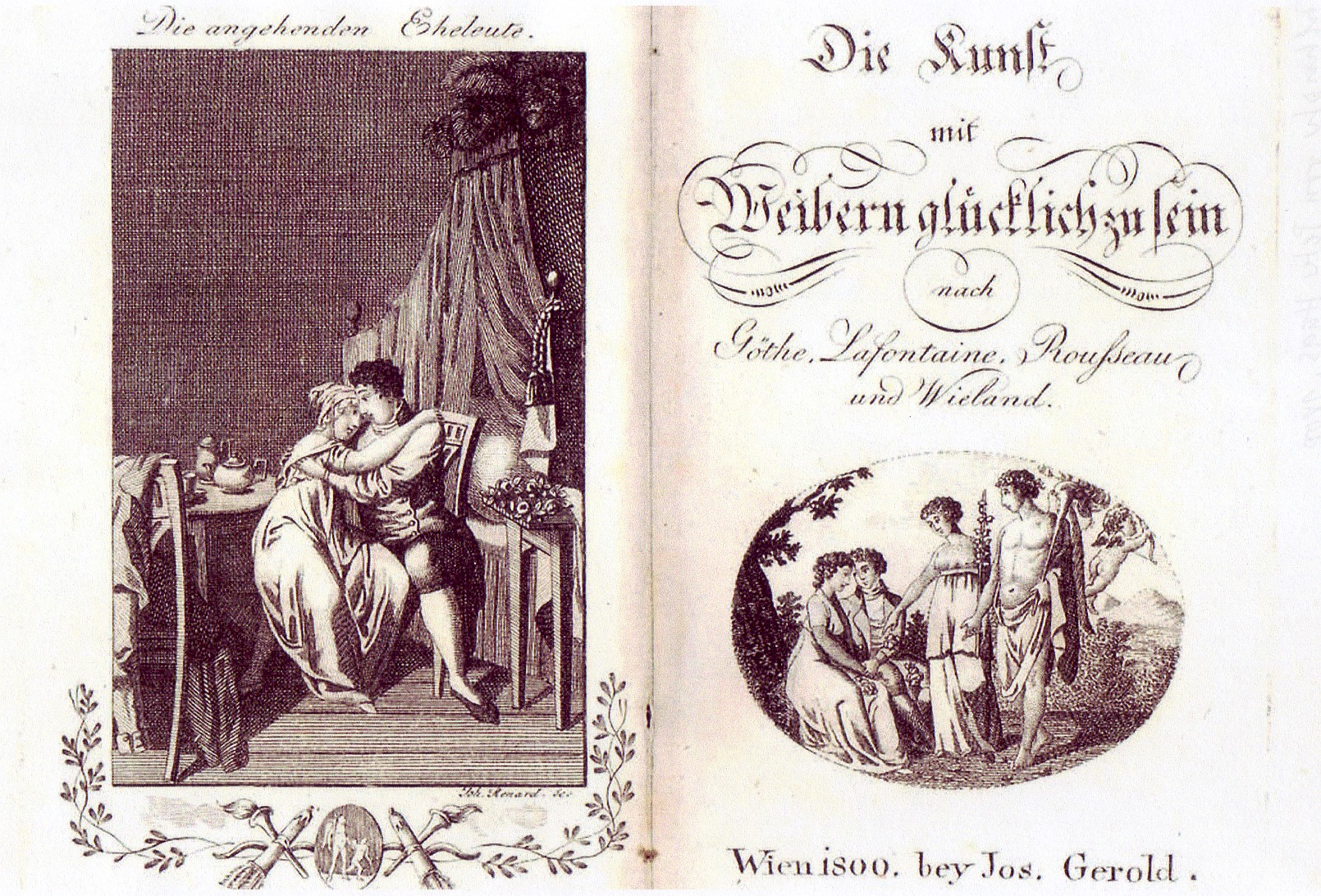 "Die Kunst mit Weibern glücklich zu sein." Titelseite mit Kupferstichen.